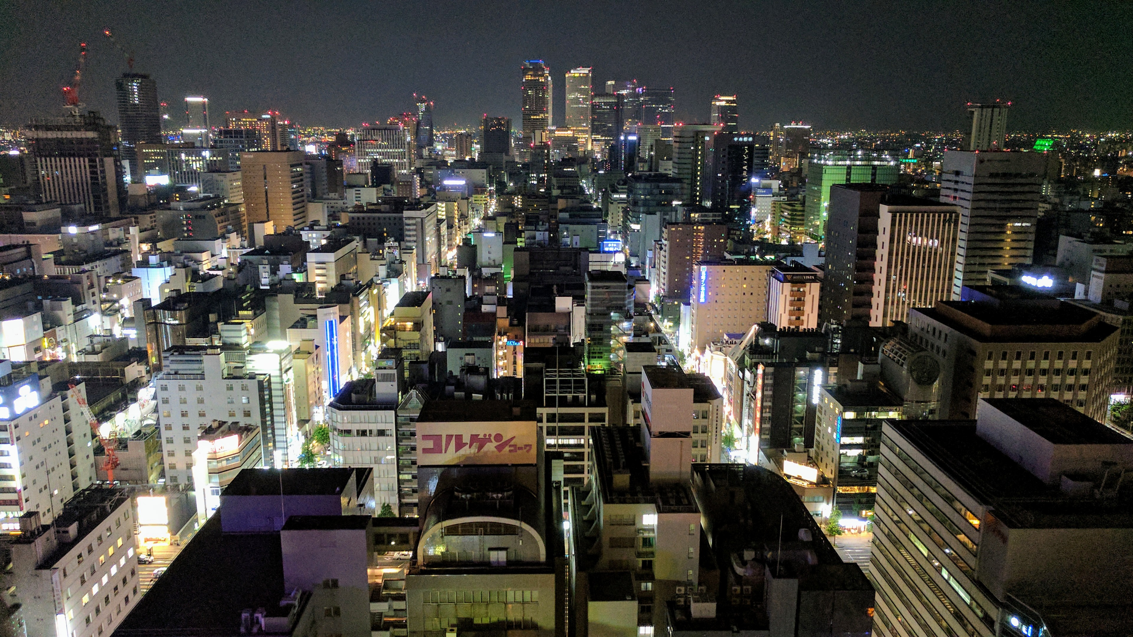 IMG_20170520_204854